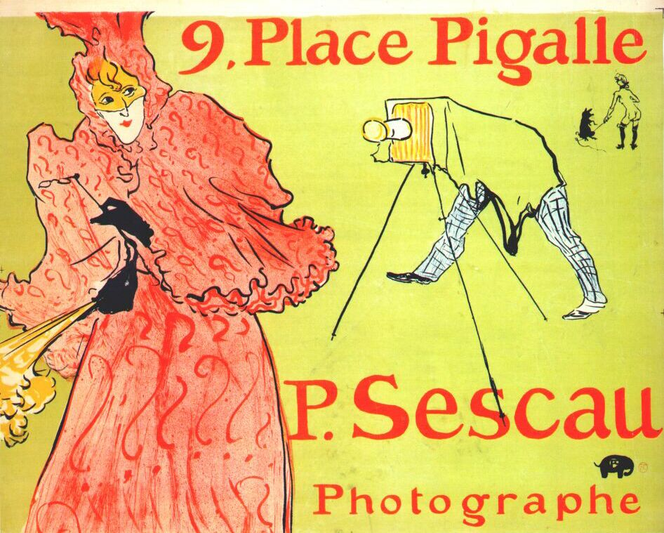 The_photographer_sescau_(poster) 1896 Sescau photographe Affiche publicitaire Pour le photographe Paul Sescau, lithographie de Toulouse-Lautrec, 1896.